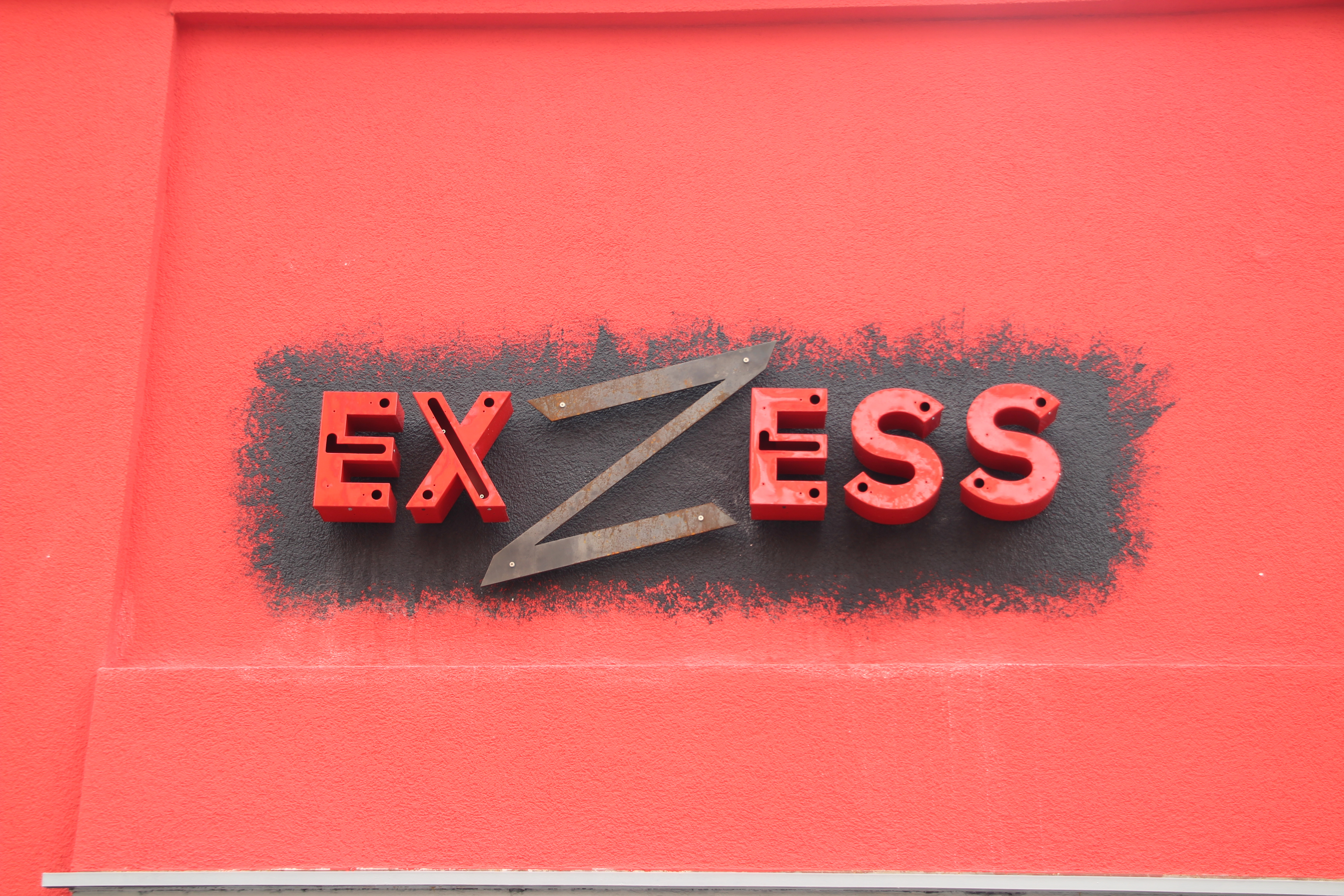 Bildinhalt: Schriftzug des autonomen Jugendcafés ExZess in der Leipziger Straße 91, gegenüber Ecke Basaltstraße Aufnahmeort: Frankfurt am Main, Deutschland